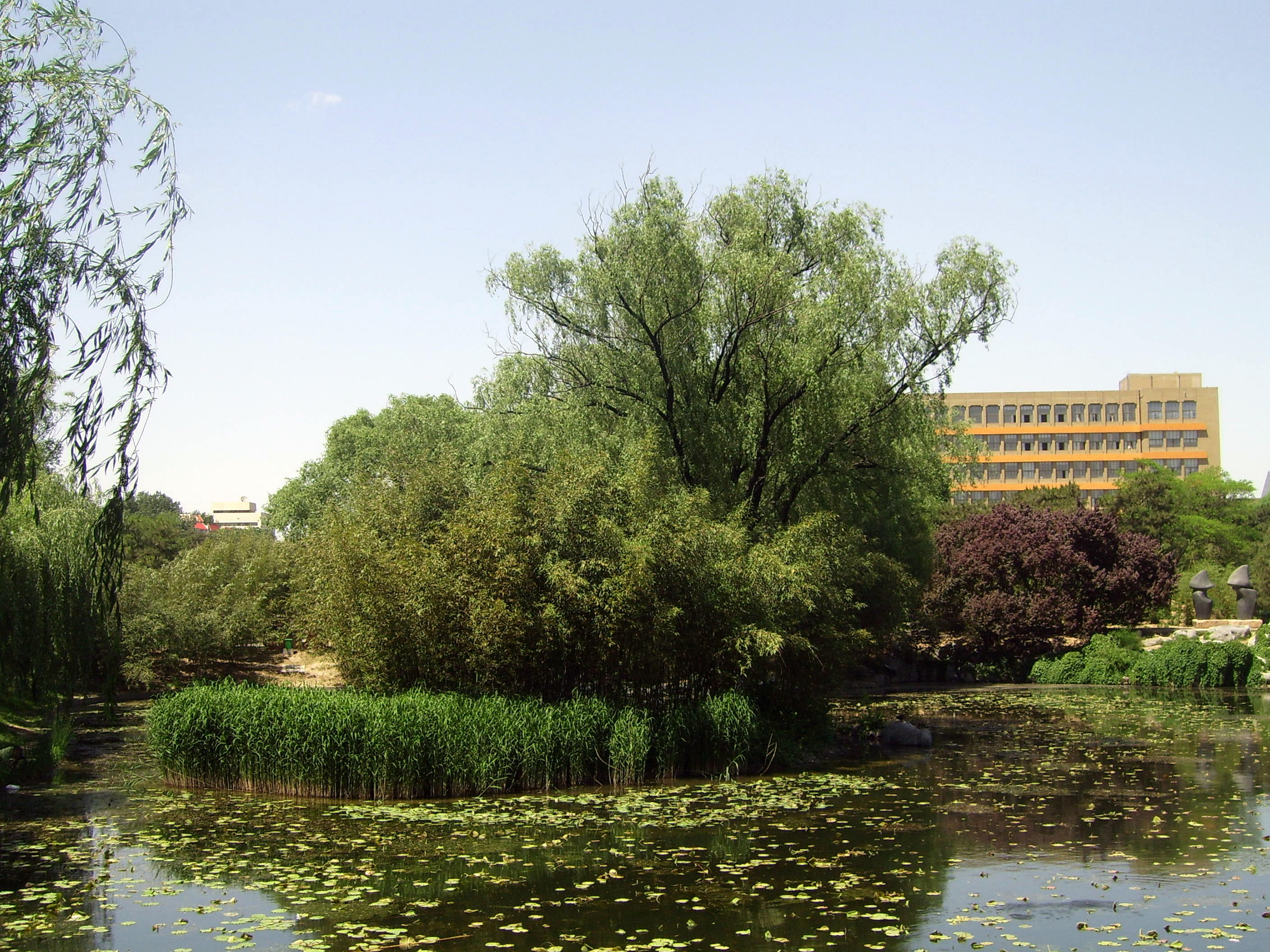 紫竹院公园一景